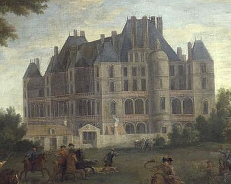 Château de Madrid dans le bois de Boulogne vers 1722. Huile sur toile, détail.